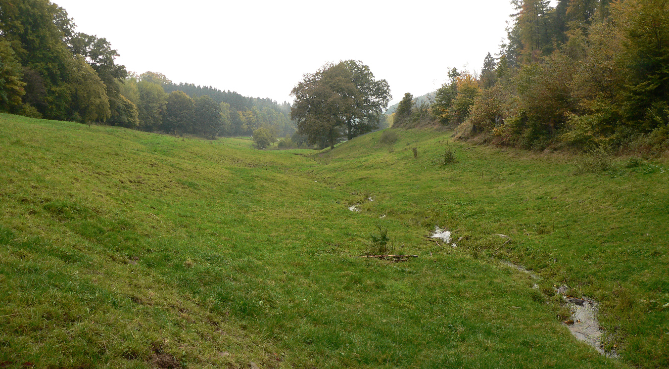 Kreickgrund talabwärts